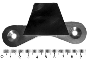 Bauteil Wirbelgenerator für die A320 Familie